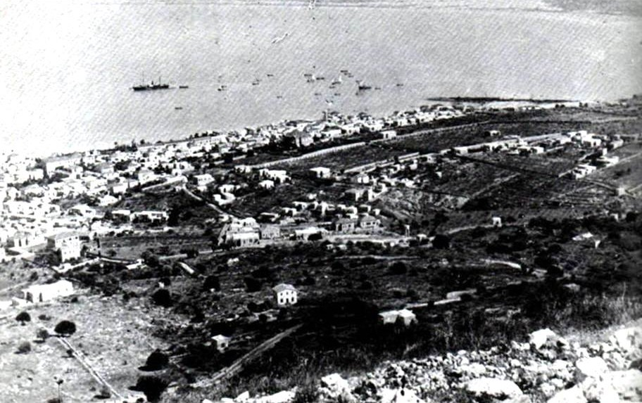 Historical images of Haifa תמונות היסטוריות של חיפה מבט על חיפה ממורדות הר הכרמל בשנת 1911